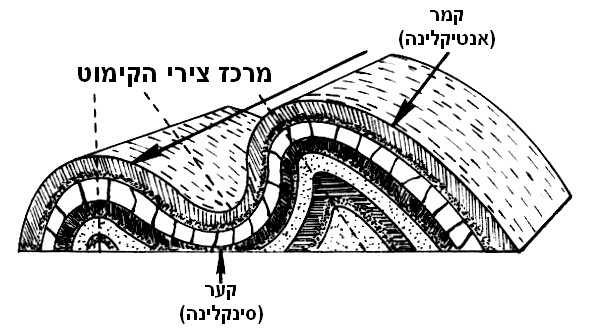 קימוט - קמר וקער